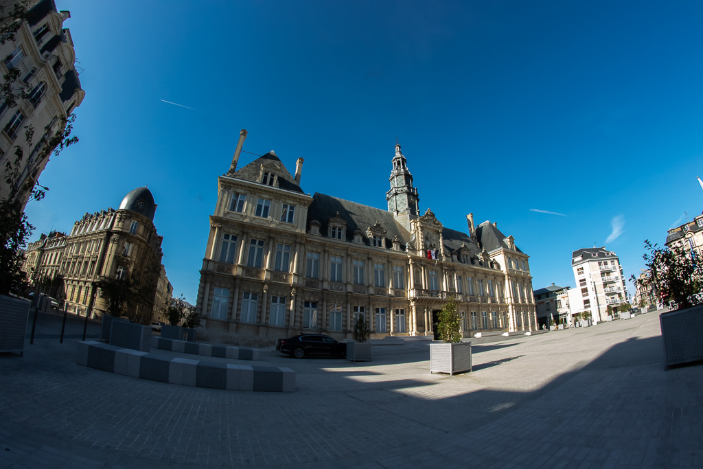 Mairie de REIMS fish eye